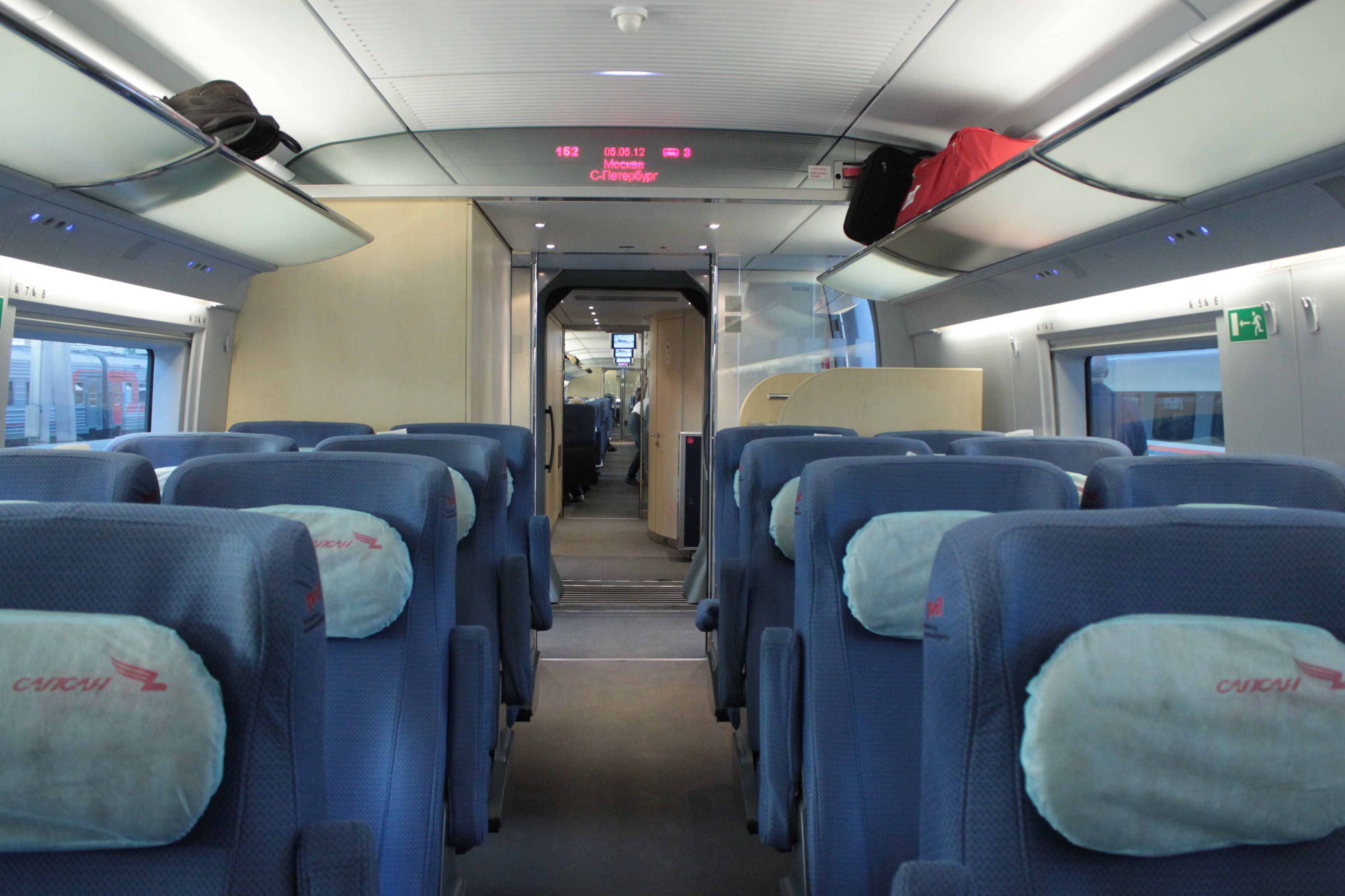 Интерьер поезда "Сапсан"